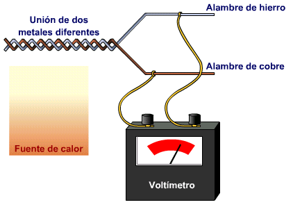 Descripción: diagrama simple del funcionamiento del termopar. Autor: Luis María Benítez. Enlaces relacionados: Termoelectricidad, célula Peltier, Efecto Seebeck, Efecto Peltier, Efecto Thomson, Generador termoeléctrico. Enlaces externos: Introducción a la termoelectricidad, , Termoelectricidad, el “Arte de Refrigerar”, International Thermoelectric Society (ITS), [1], [2], [3], , , [4], [5], , , [6], [7], A Ladder Thermoelectric Parallelepiped Generator, The Ladder Hypothesis, High Frequency Thermoelectric Generator, Varmaraf.